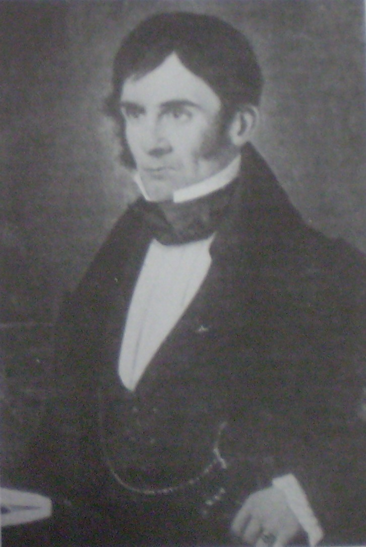 Agustín José Donado